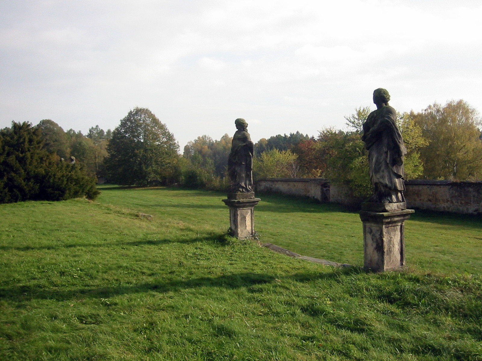 Lemberk, Schlossgarten